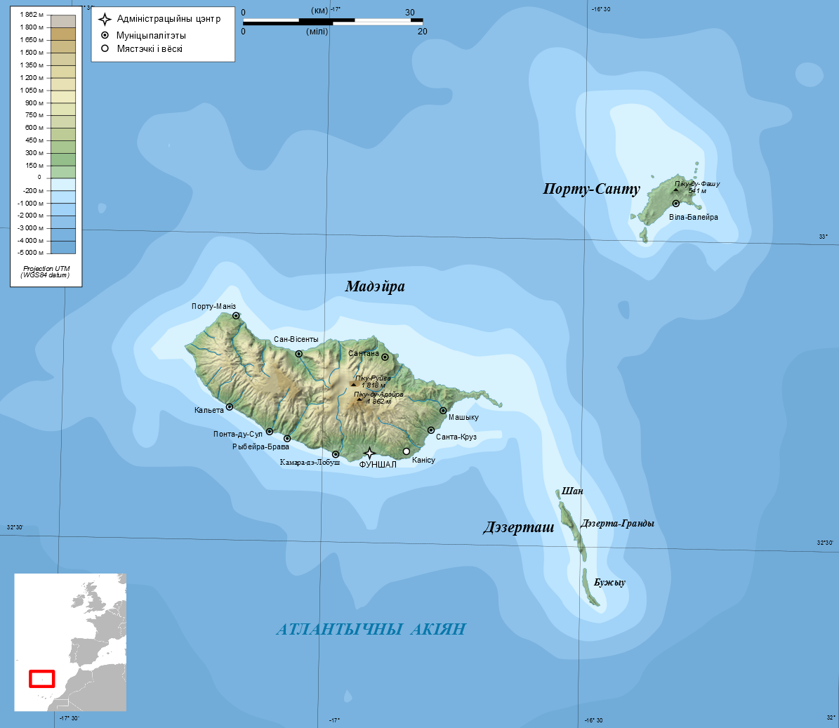 Карта Мадэйры